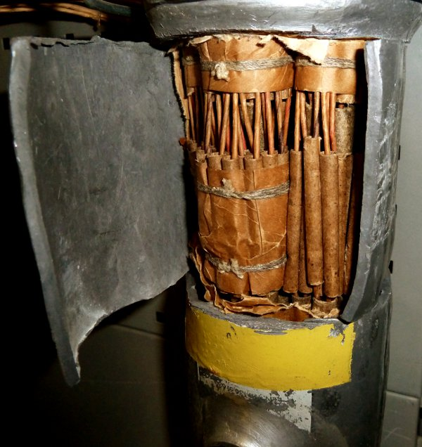 Kabelmuffe aus Blei (Bleimuffe) zum Verbinden von Papierkabel mit den Isolierhülsen aus Hartpapier